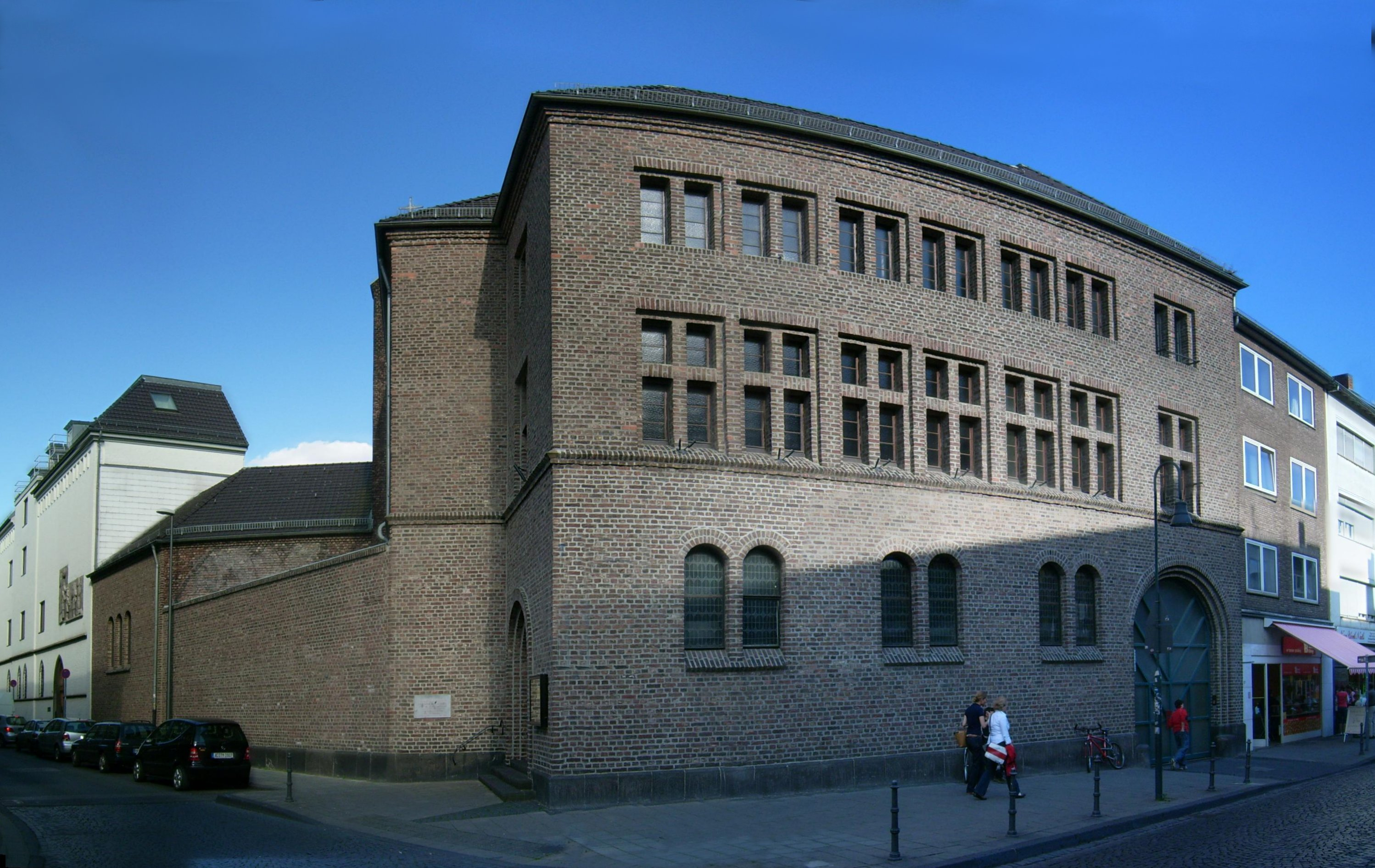 Kloster an der Kleinmarschierstraße in Aachen